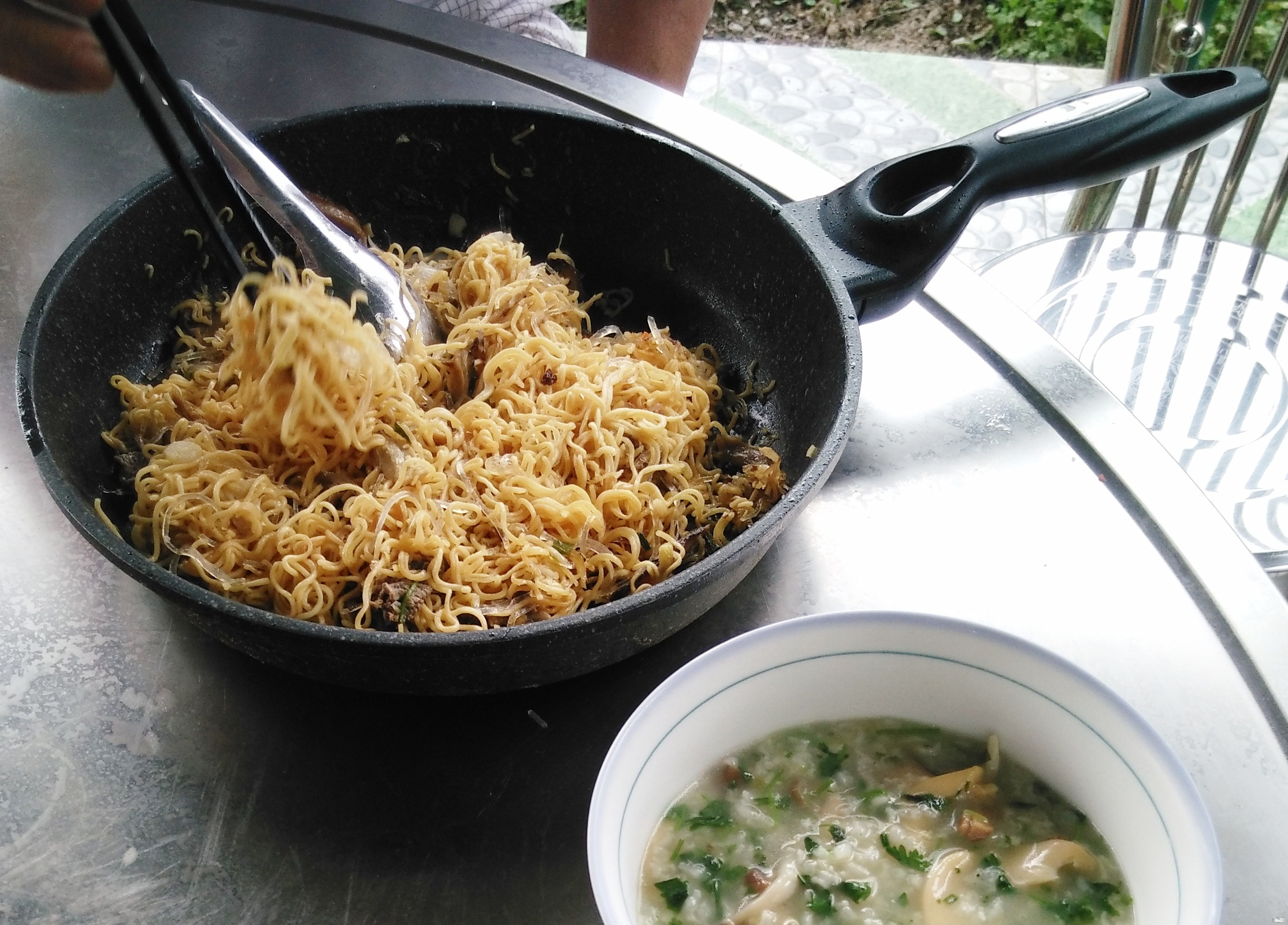 Mì xào Đông Hà, Tết 2018